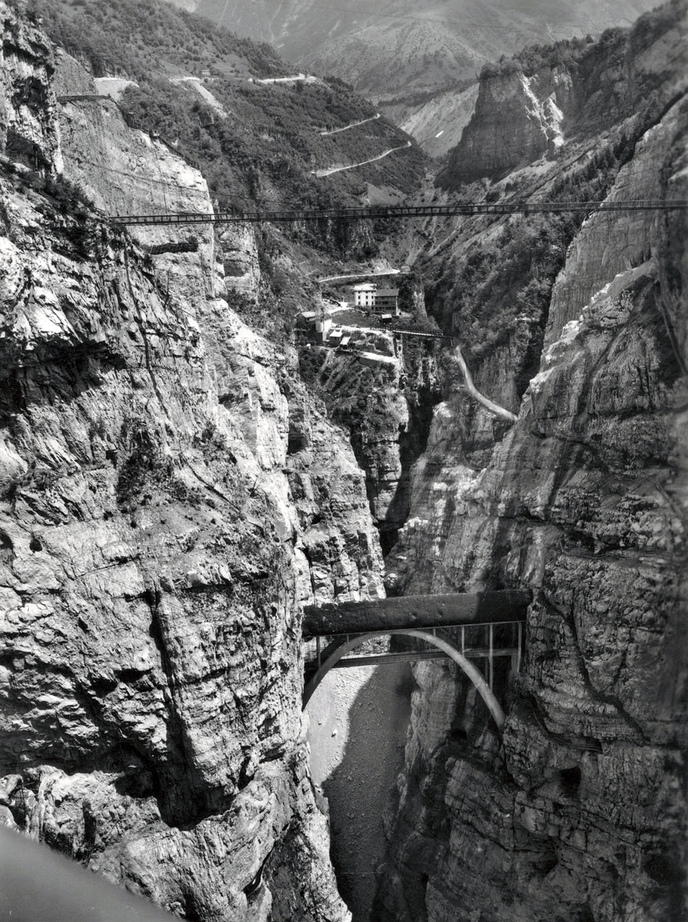 La stretta forra del torrente Vajont, dove verrà costruita la diga. In primo piano il ponte tubo, e dietro la chiesetta, con l'osteria al Colomber, con il ponte Bailey dell'esercito inglese, posato dopo la 2° guerra mondiale, in sostituzione del precedente in cemento armato, all'epoca il più alto d'Italia 130 mt. In alto l'ardita passerella di servizio per il cantiere della diga